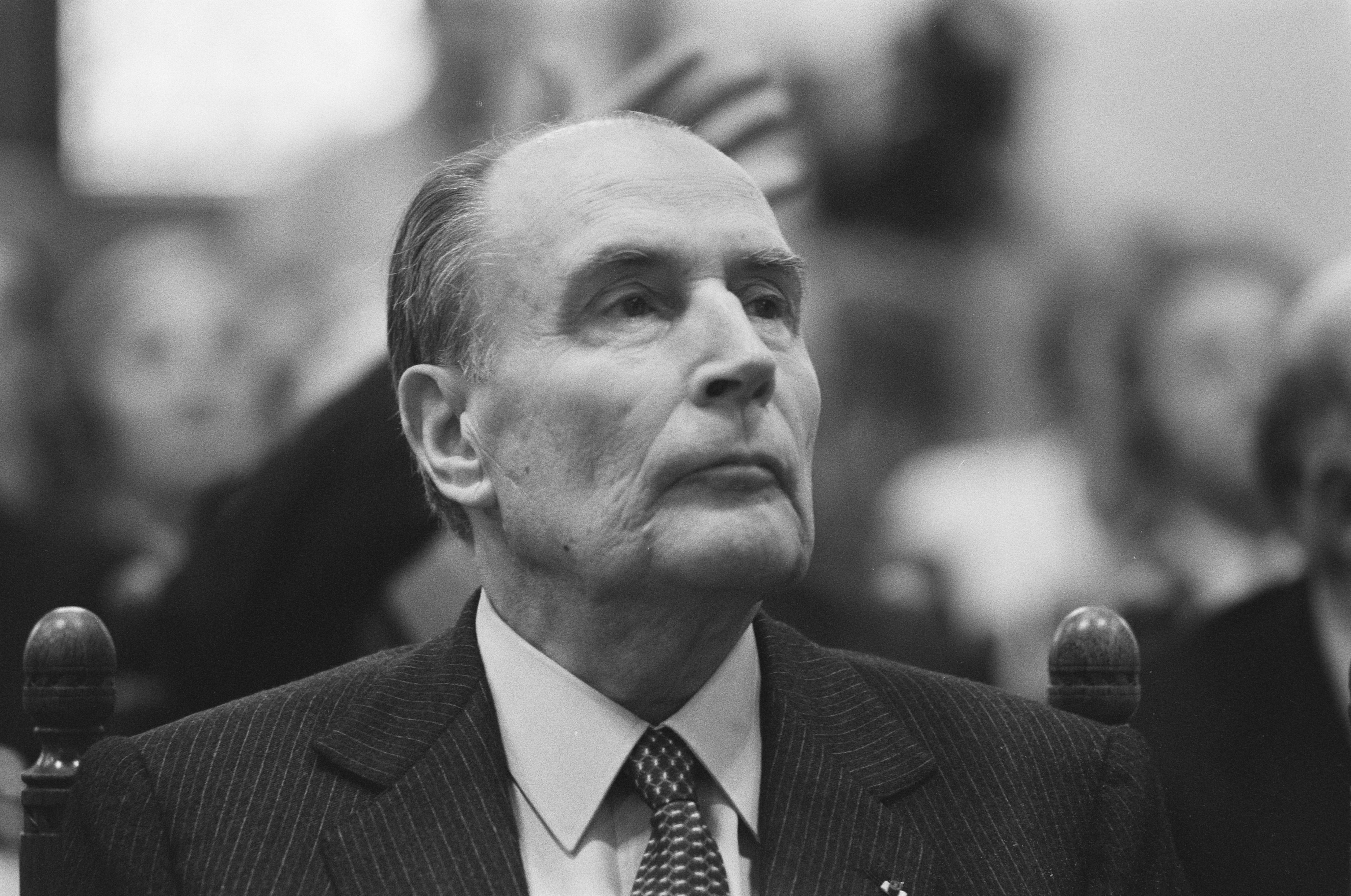 Collectie / Archief : Fotocollectie Anefo Reportage / Serie : [ onbekend ] Beschrijving : President Mitterand bij slotzitting Europa Congres ; Mitterand, kop Datum : 7 mei 1988 Trefwoorden : congressen, presidenten Persoonsnaam : Mitterrand, François Fotograaf : Croes, Rob C. / Anefo Auteursrechthebbende : Nationaal Archief Materiaalsoort : Negatief (zwart/wit) Nummer archiefinventaris : bekijk toegang 2.24.01.05 Bestanddeelnummer : 934-2444